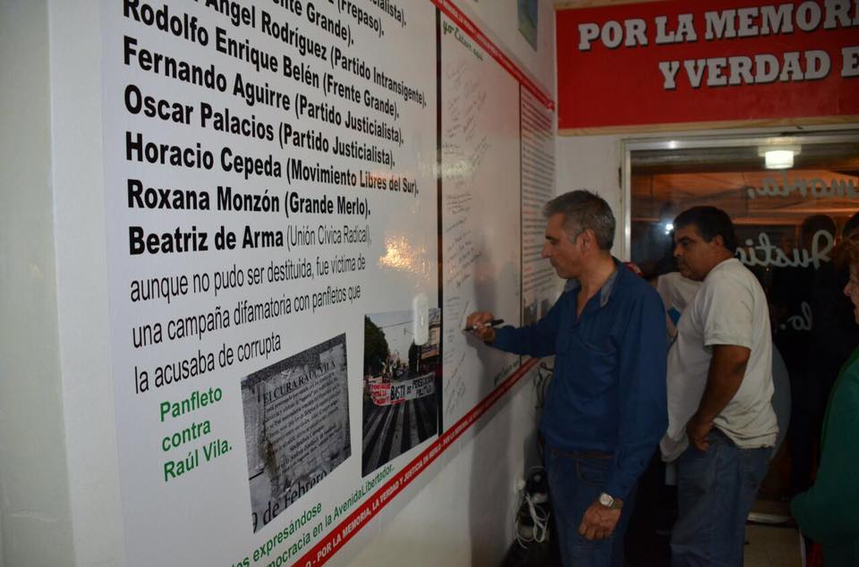 Inauguración del Espacio para la Memoria Manuel de Arma, Merlo, Provincia de Buenos Aires.